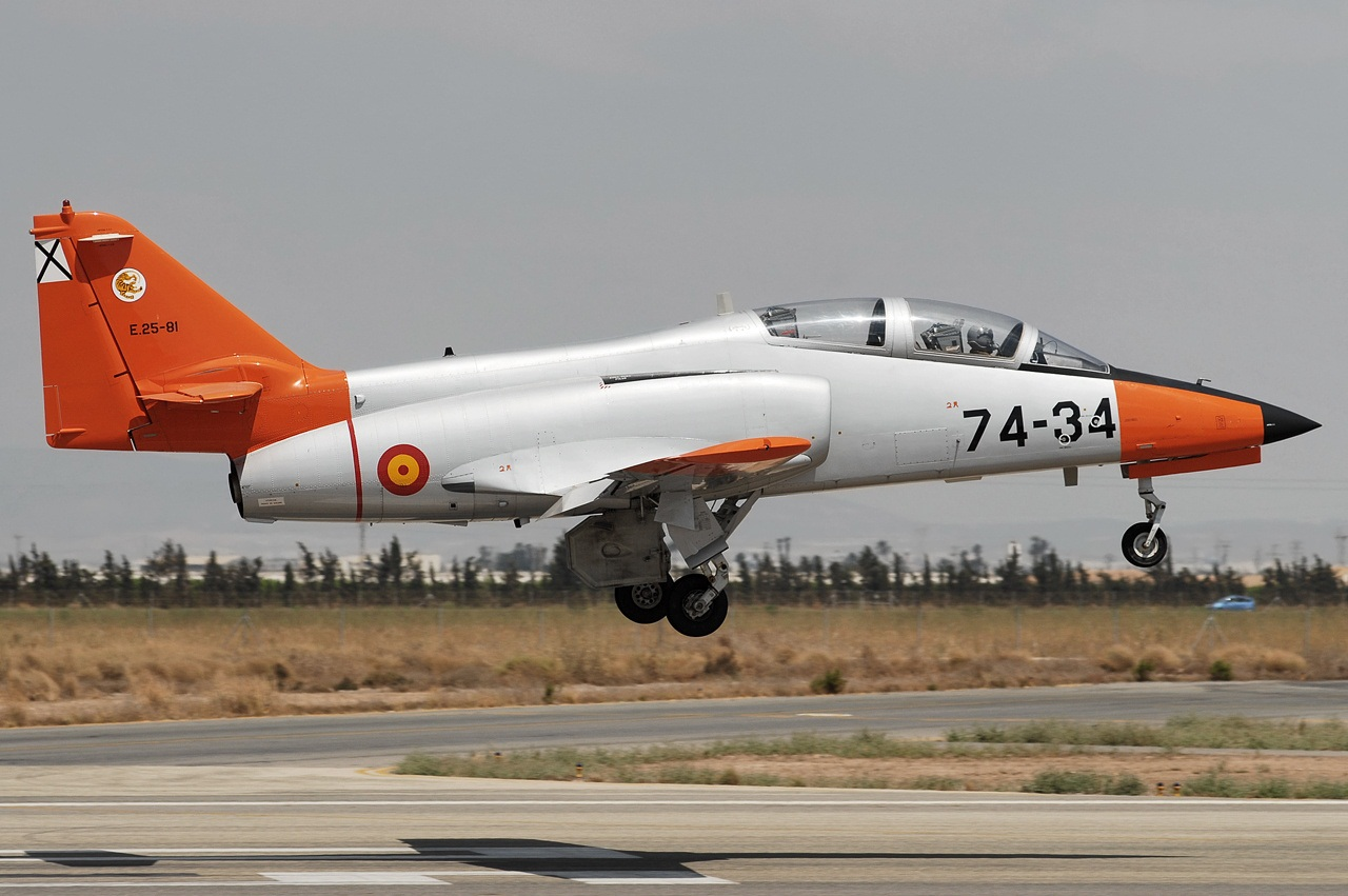 E25-81 / 74-34 (cn 089)